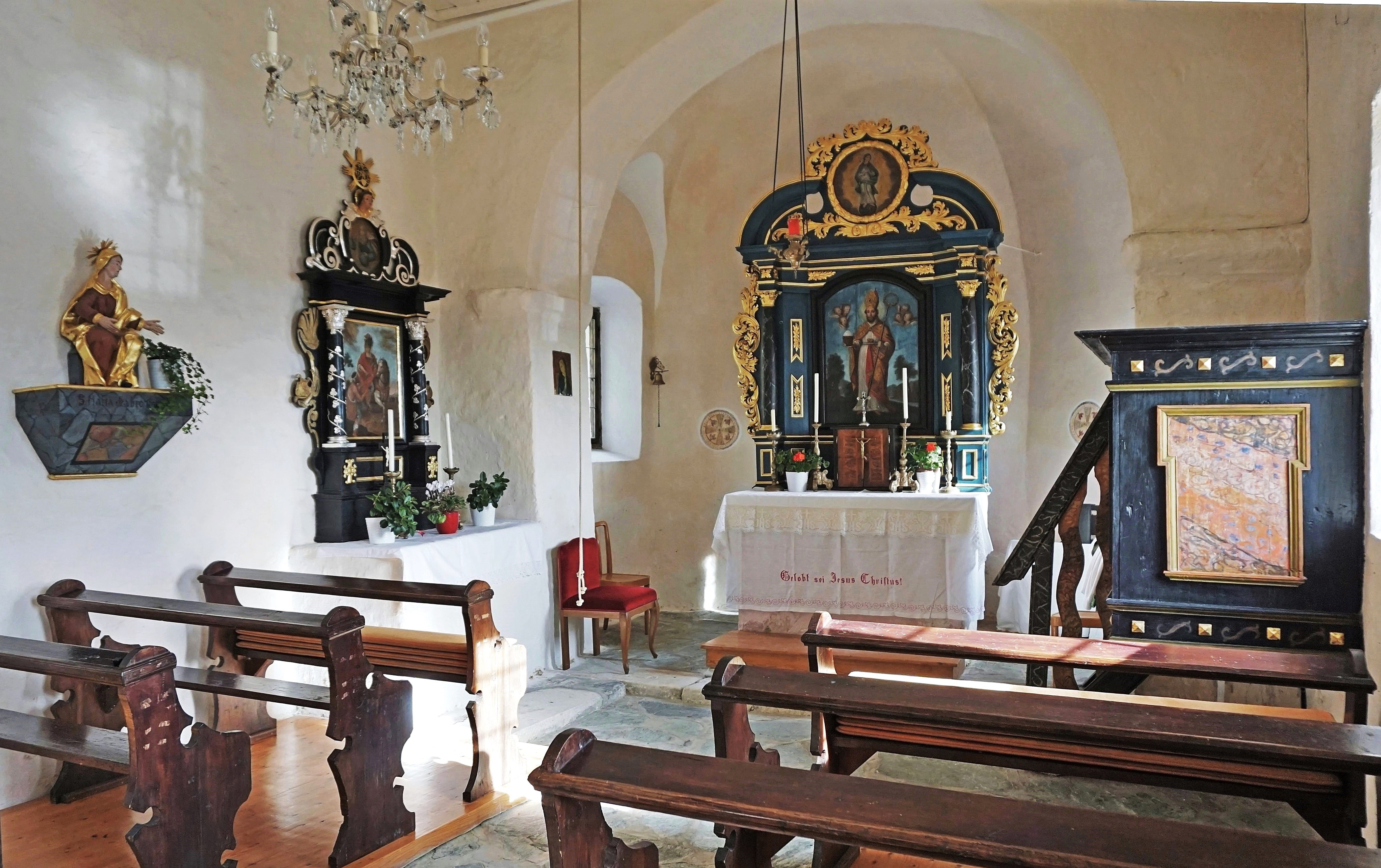 Kath. Filialkirche Hl. Rupert, Nußberg (Moosburg in Kärnten)